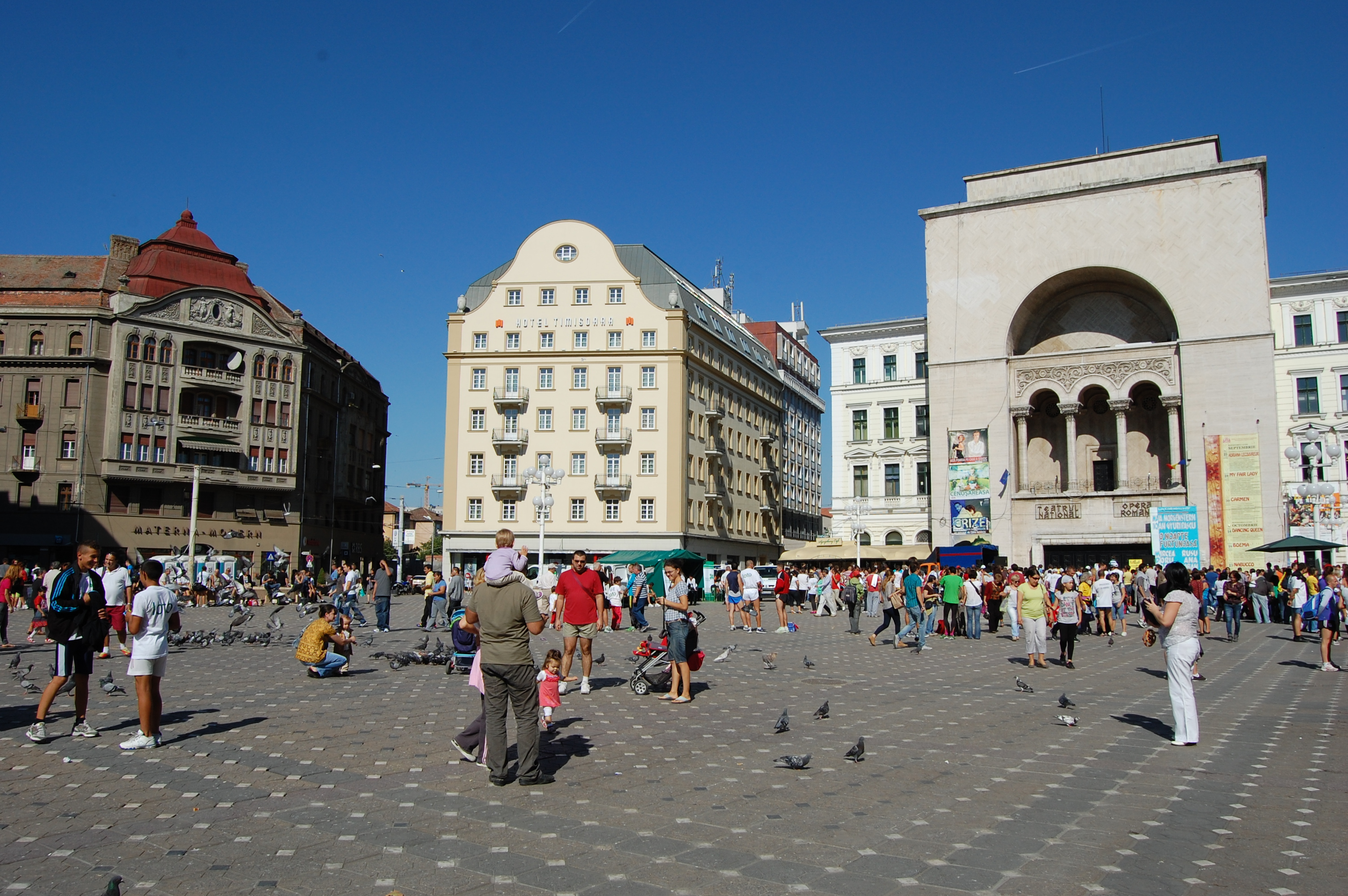 Piata Operei, Timisoara